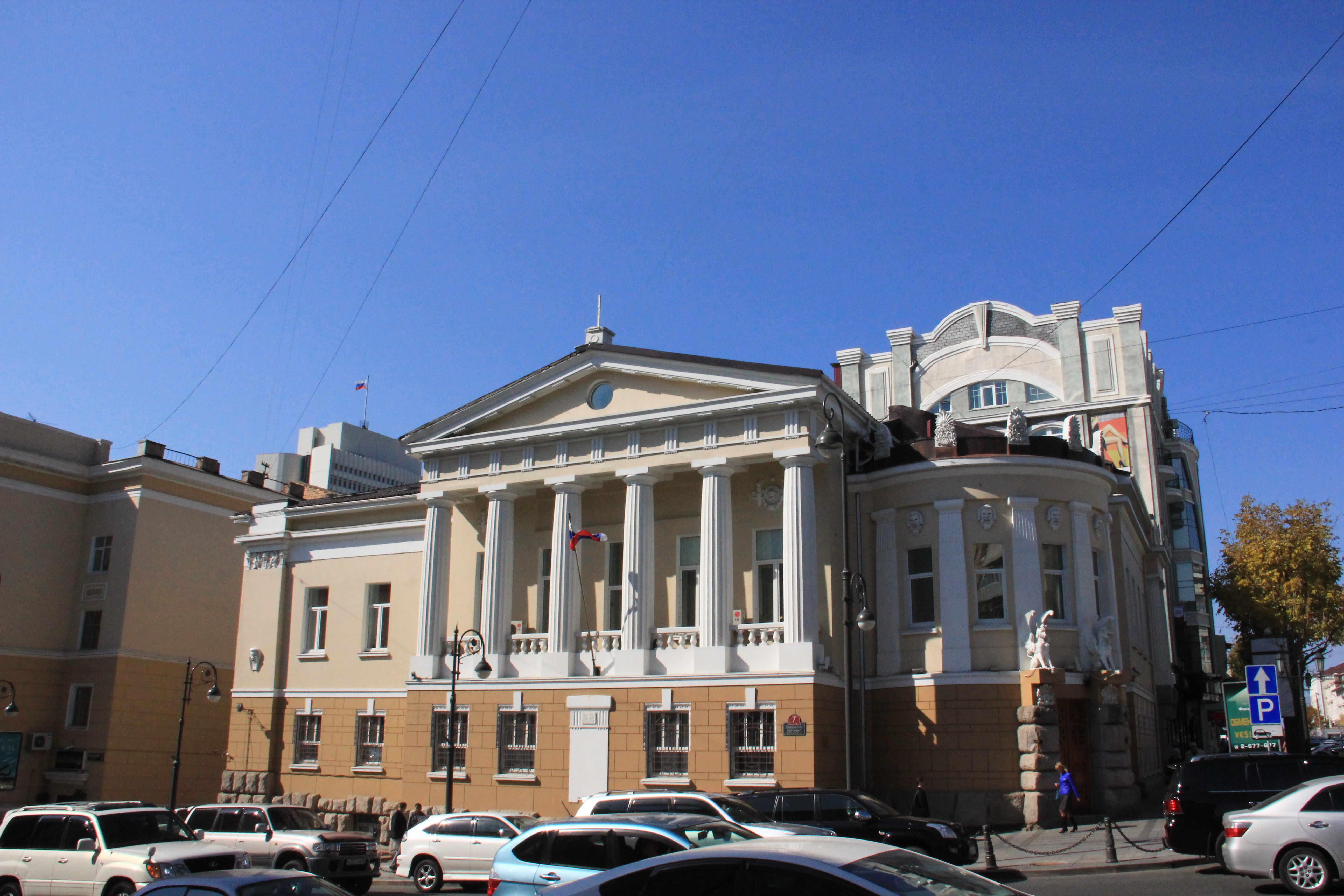 Консульство Японии (Приморский край, Владивосток, Океанский проспект, 7)